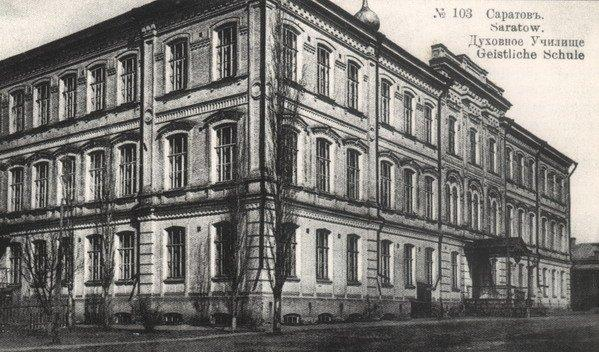 Здание Саратовского духовного училища